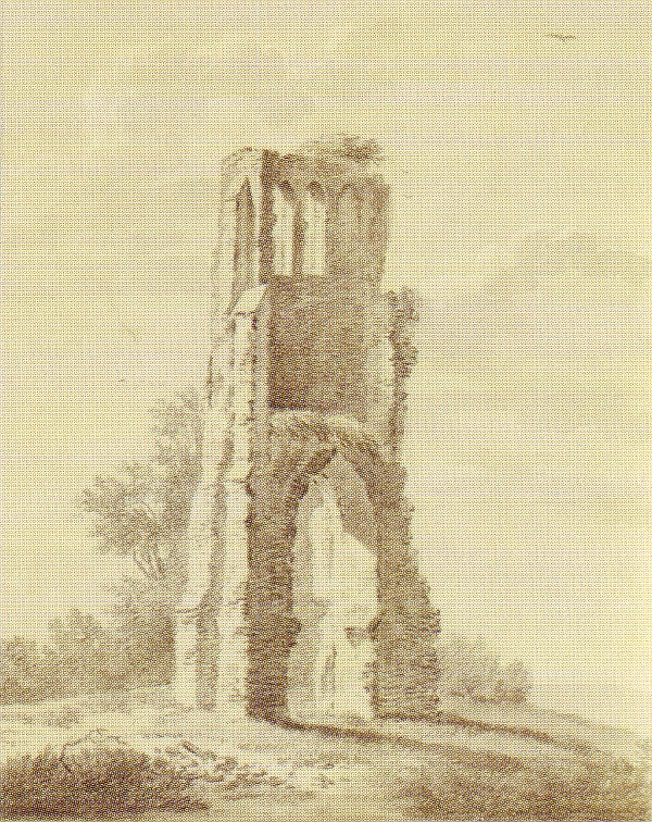 Kertoren Sint Janskerke (Veere)